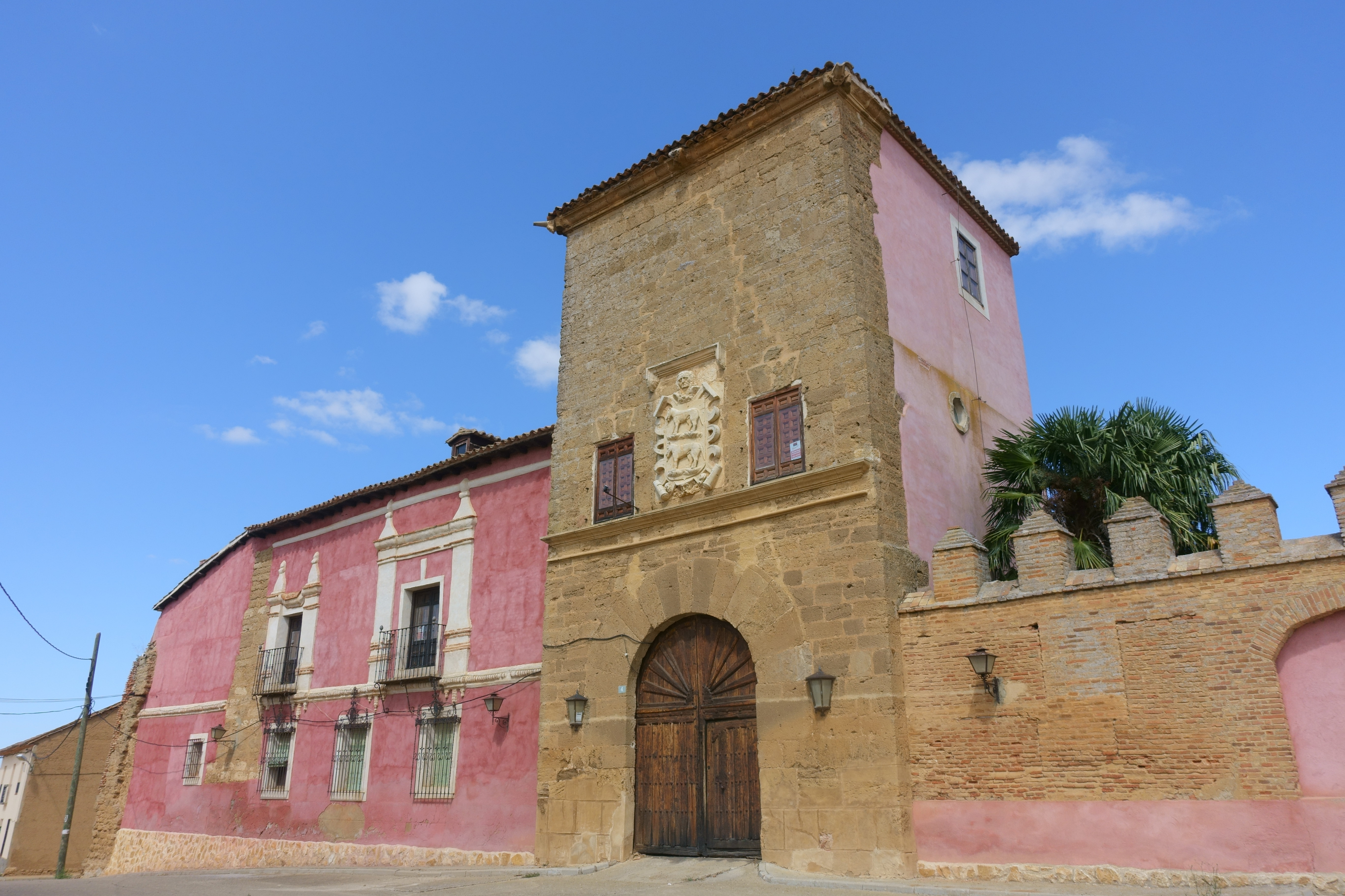 Palacio de los Duques de Alba, Valdunquillo (Valladolid, España).